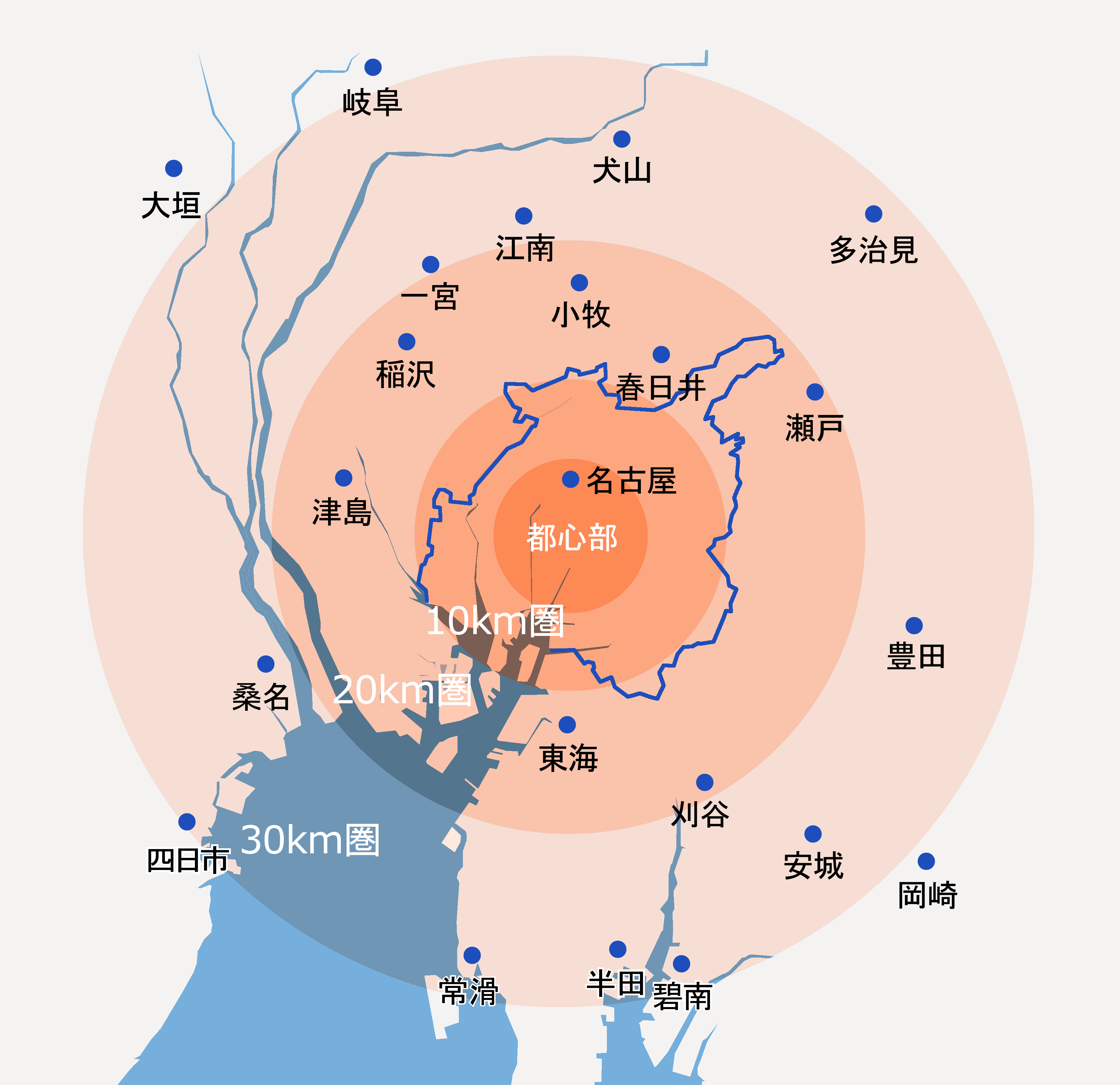 名古屋市と周辺都市の位置関係図